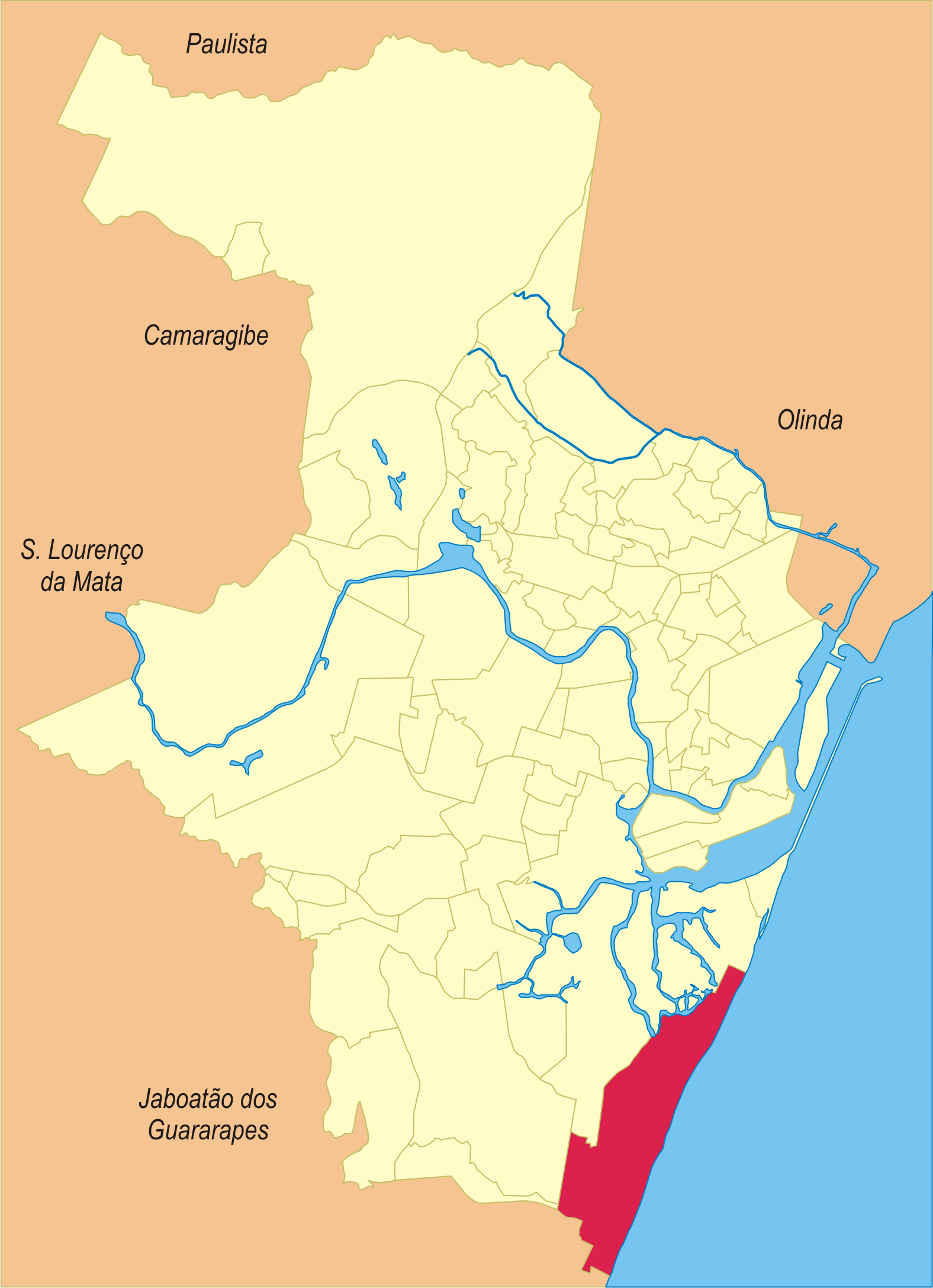 Localização do bairro de Água Fria